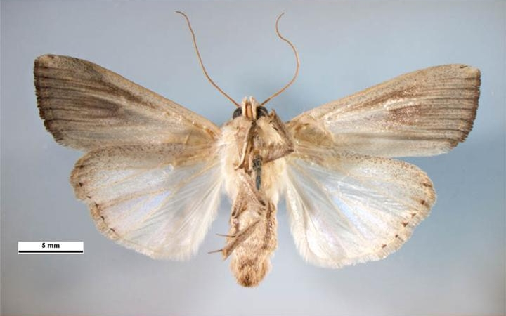 Leucania stenographa ventral view